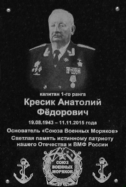 В 2016 году на фасаде часовни Резиденции русского путешественника Фёдора Конюхова, в Москве, «Союзом Военных Моряков» была установлена мемориальная доска в честь основателя союза - капитана 1 ранга Кресика Анатолия Фёдоровича.